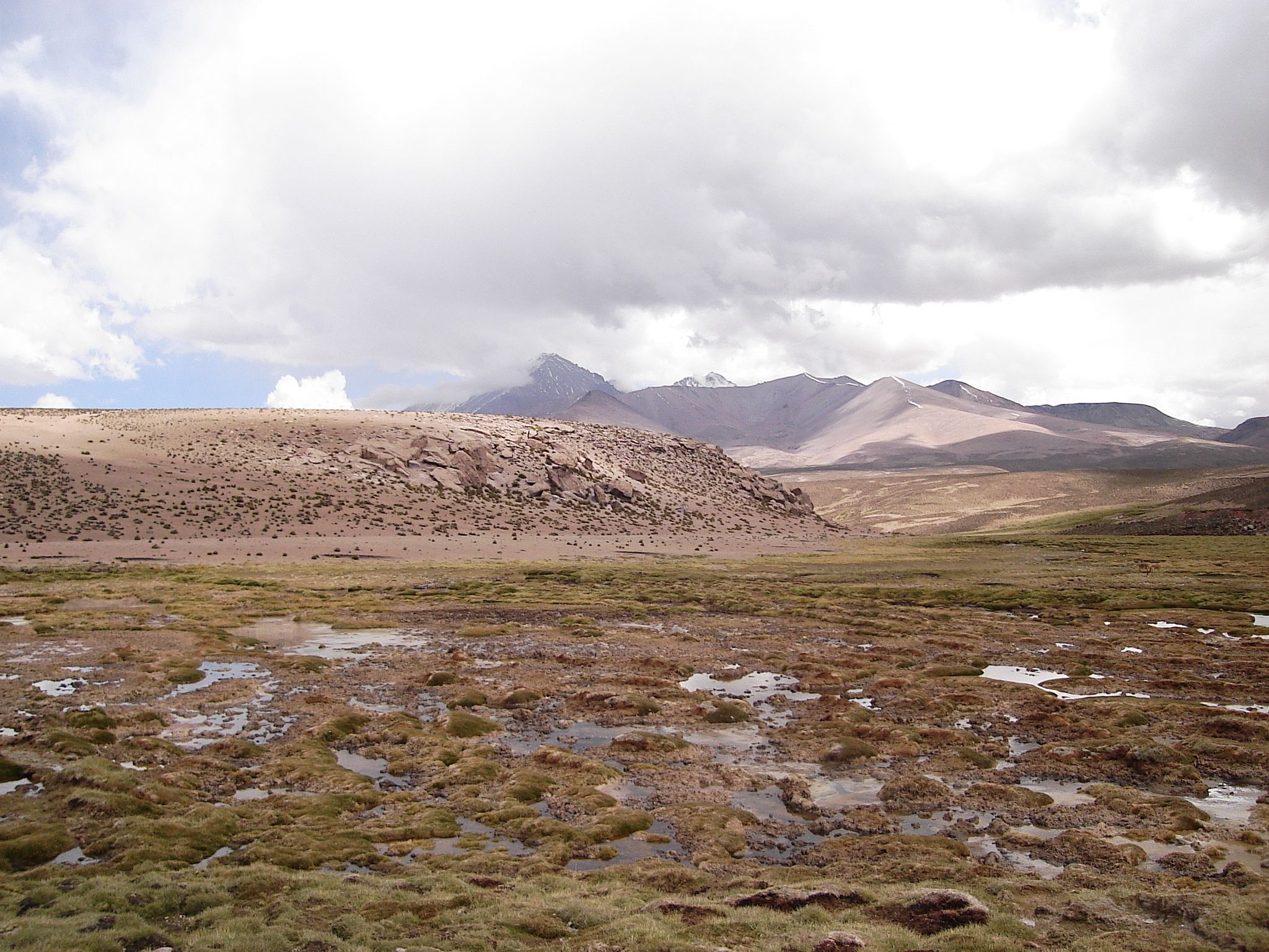 Foto tirada por mim, em Arica.